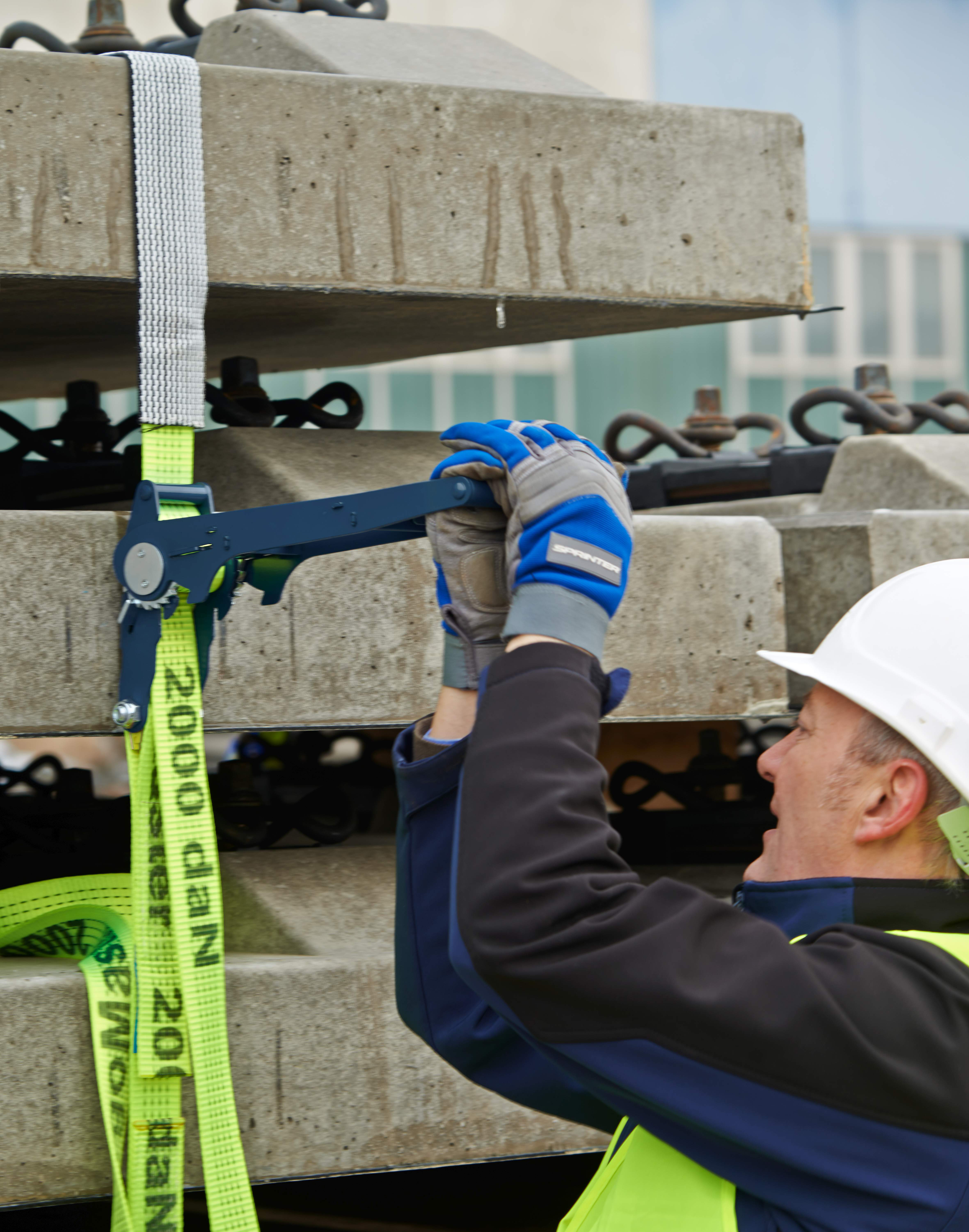 Dieses Foto ist von der SpanSet GmbH & Co. KG, Jülicher Str. 49-51 52531 Übach-Palenberg zur Verfügung gestellt worden. Um das Bild zu verwenden, bedarf es einer Lizenz der SpanSet GmbH & Co. KG.